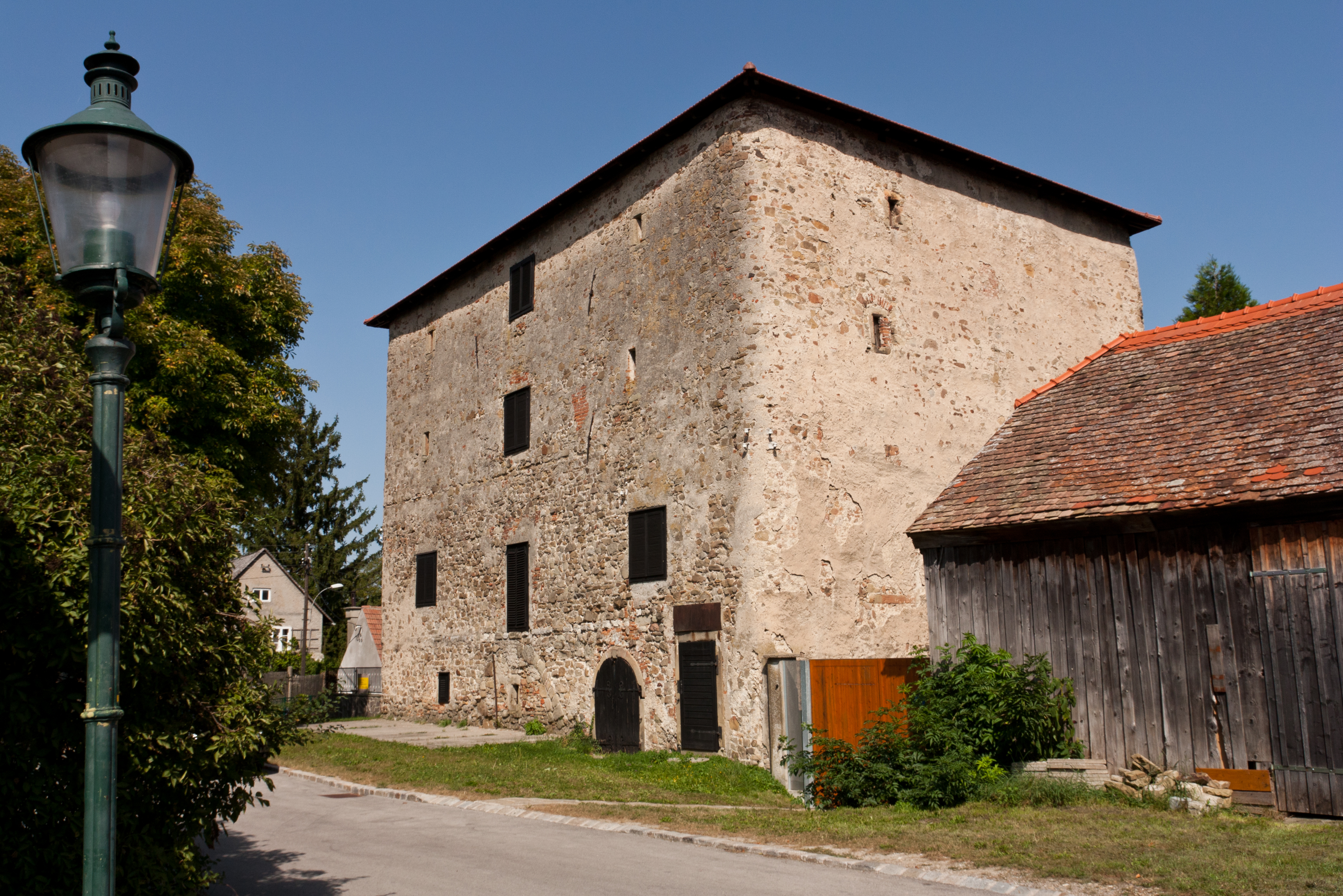 "Körnerkasten", spätrömischer Getreidespeicher